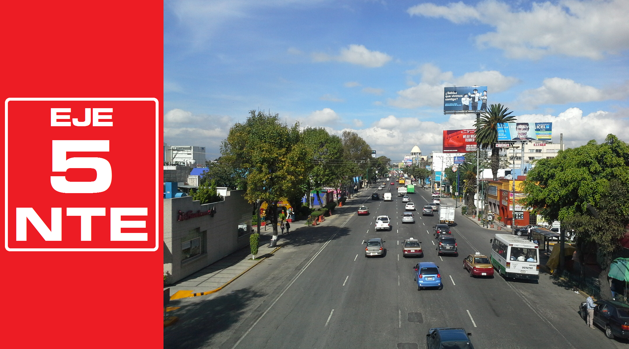 Rediseñado original de la señalética de los Ejes viales de la Ciudad de México por José García (Wiki ID: narumiyama)